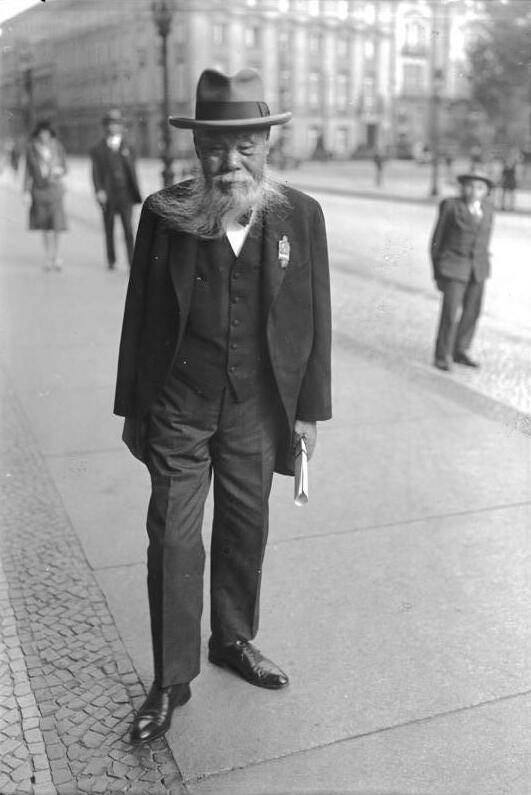 Der große Congress der Inter-Parlamentarischen Union im Reichstag in Berlin! Wichtige ausländische Deligationen, welche an dem Congress teilnehmen. Der prominente japanische Gelehrte Takuja Takahasschi vor dem Reichstag.